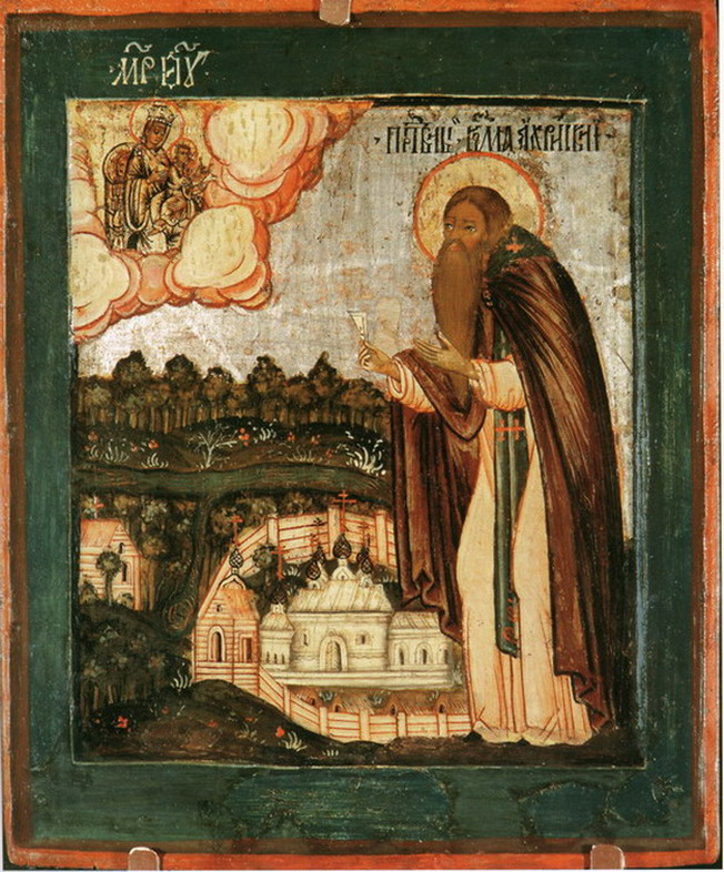 Прп. Косма Яхромский. Икона. Русь. 2-я половина XVII - 1-я четверть XVIII века. 30 х 26. Из Успенского Космина монастыря на реке Яхрени.